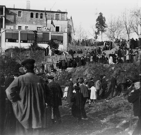 Imatge